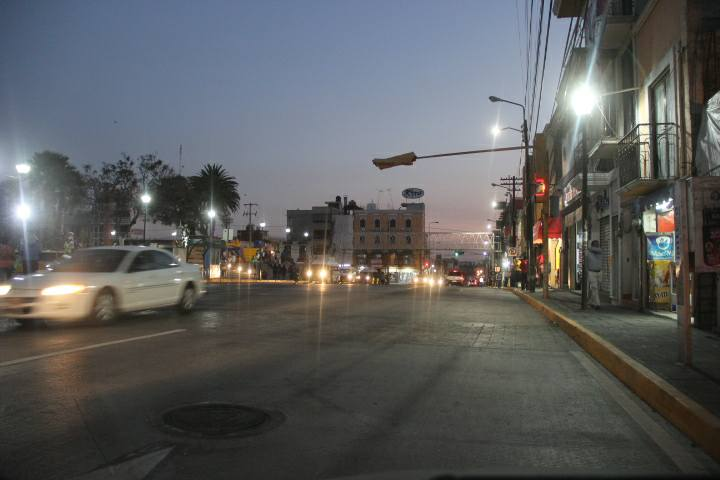 Carretera Puebla-Tlaxcala, a la altura de Zacatelco